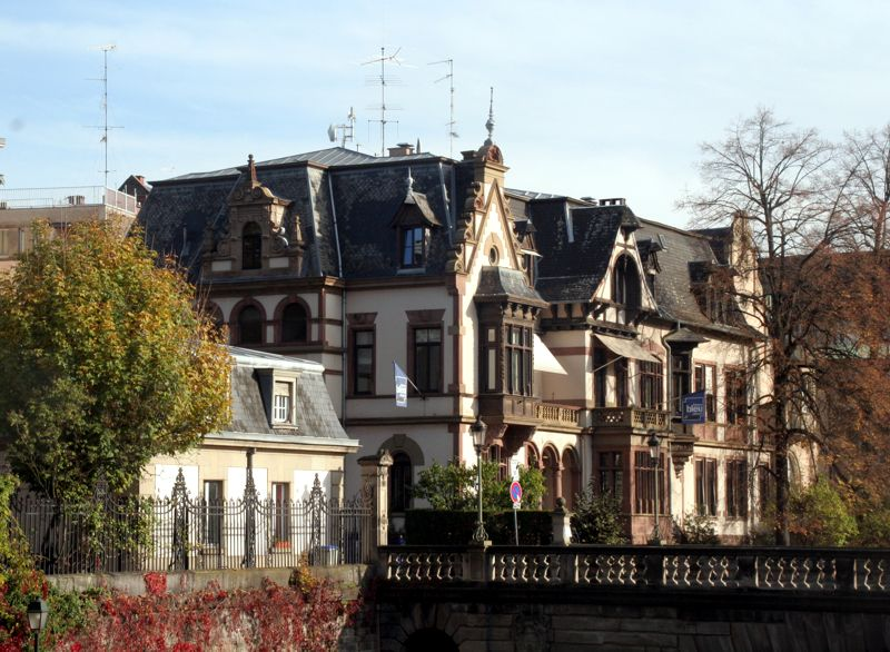 Le siège de France Bleue Alsace 4 rue Joseph Massol 67000 Strasbourg